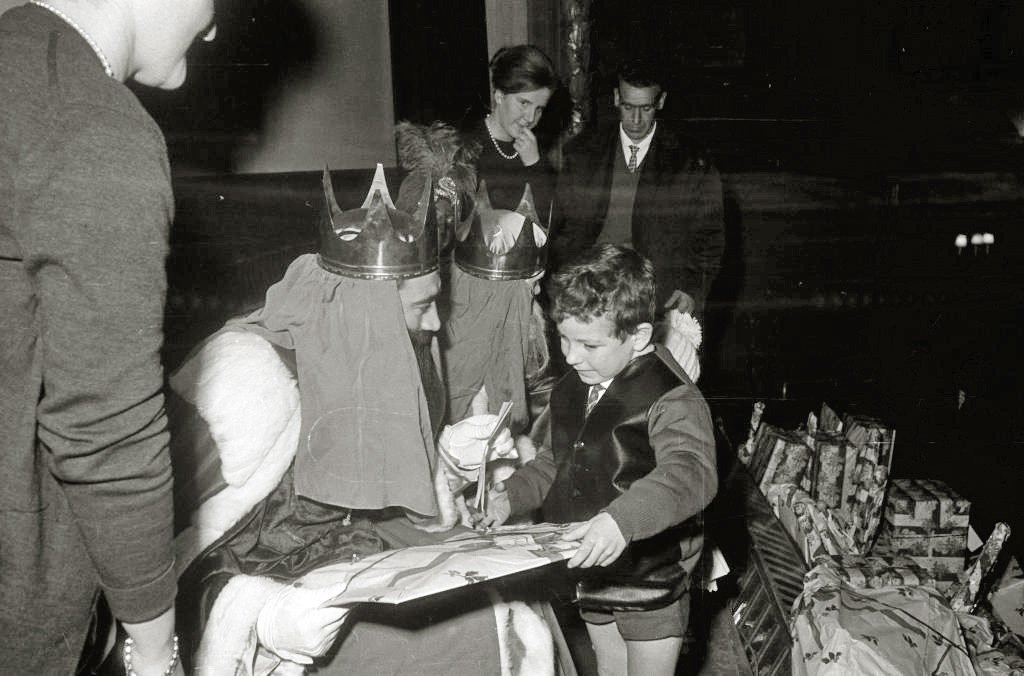 Título original: Festividad de los Reyes Magos (20/23) Localización: San Sebastián (Guipúzcoa)